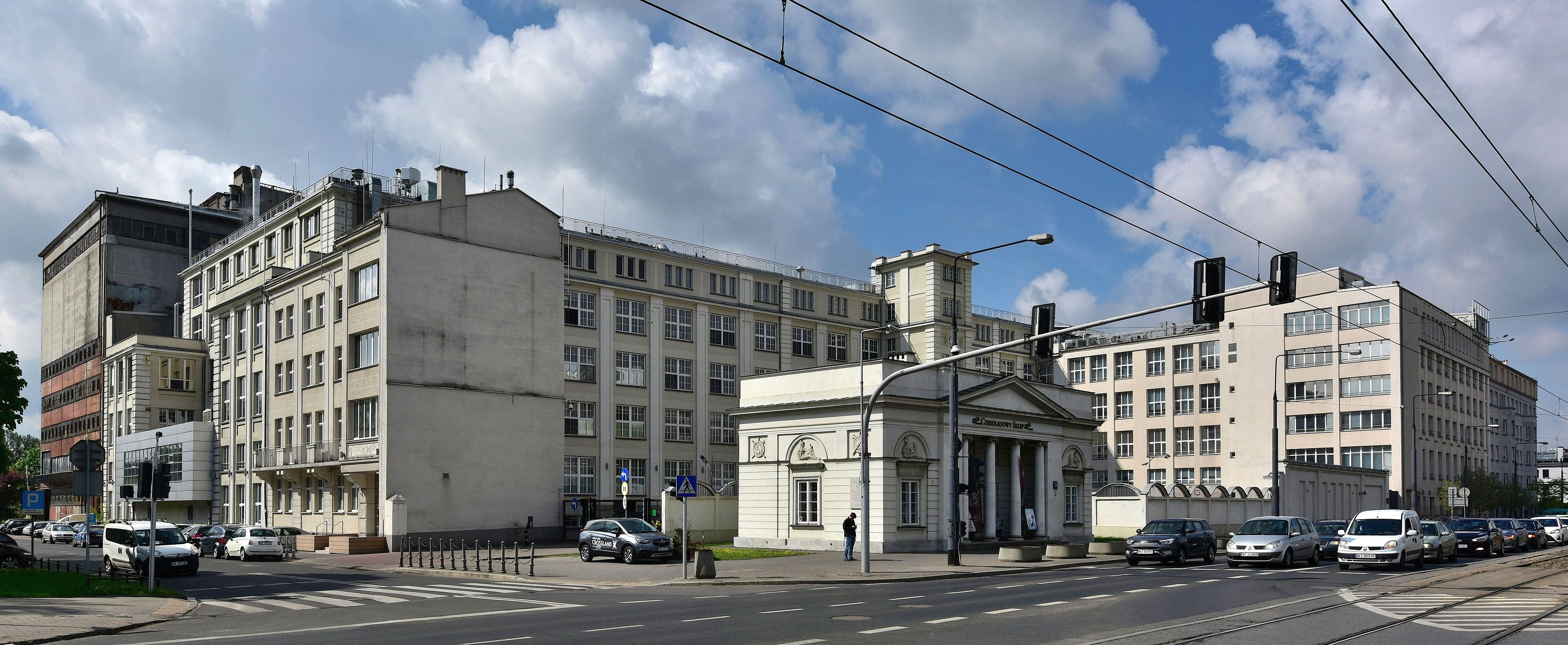 Kompleks produkcyjny Wedla przy ul. Zamoyskiego w Warszawie